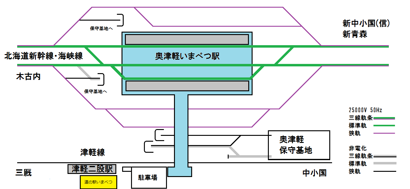 北海道新幹線開業後の奥津軽いまべつ駅周辺の配線